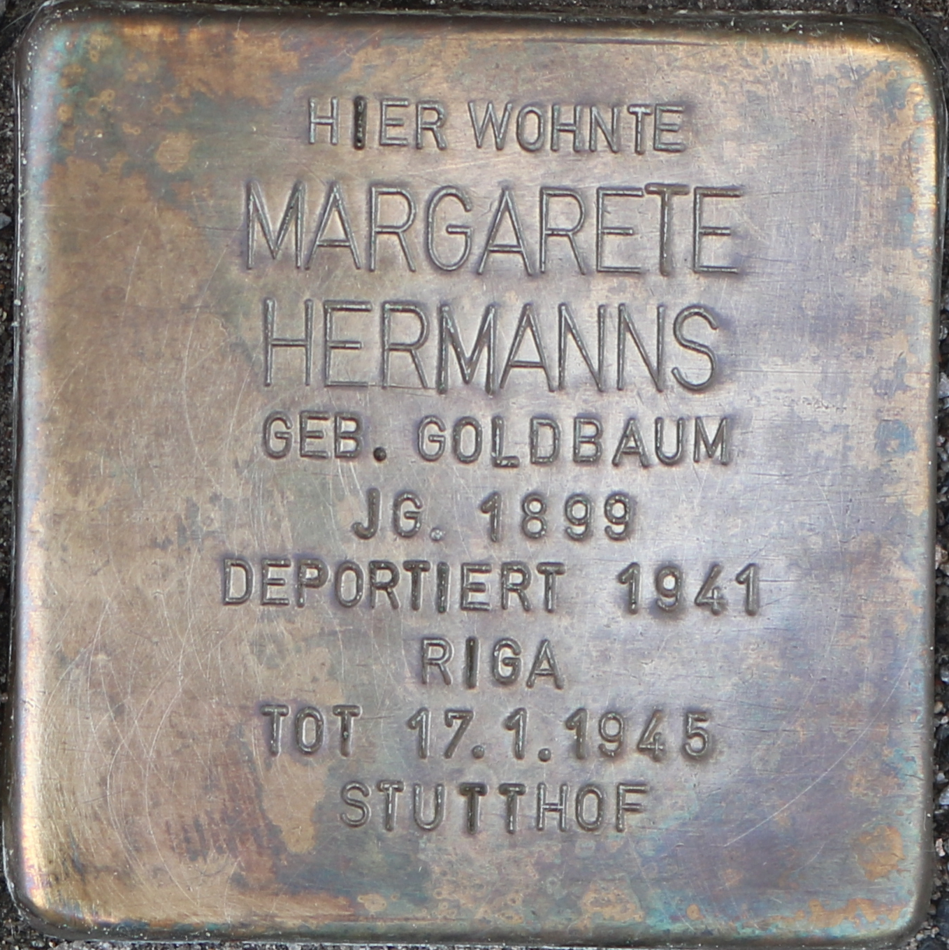 Stolperstein: Margarete Hermanns (Blücherstraße 12), Mönchengladbach.